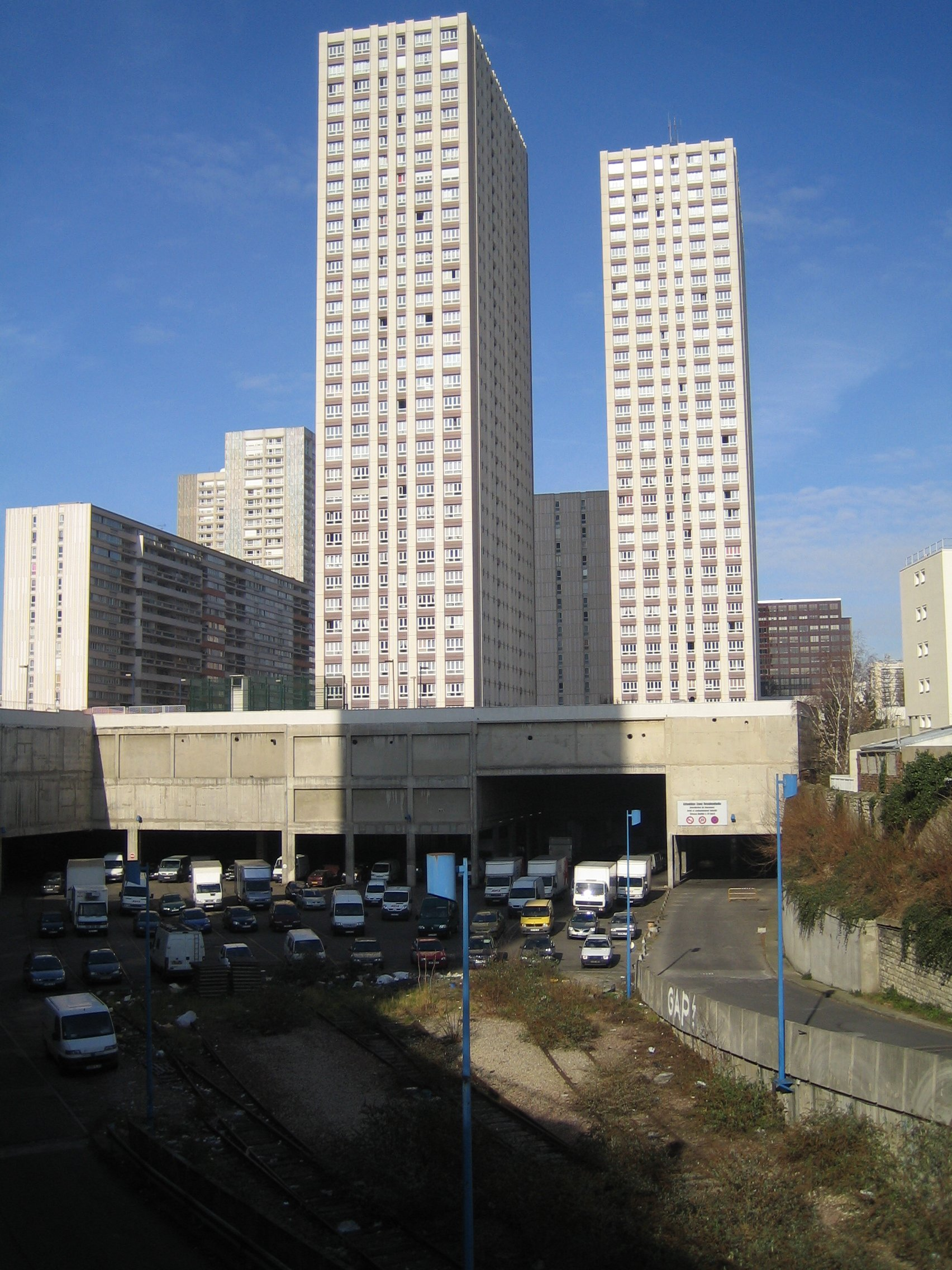 Gare des Gobelins in Paris, 13e arrondissement